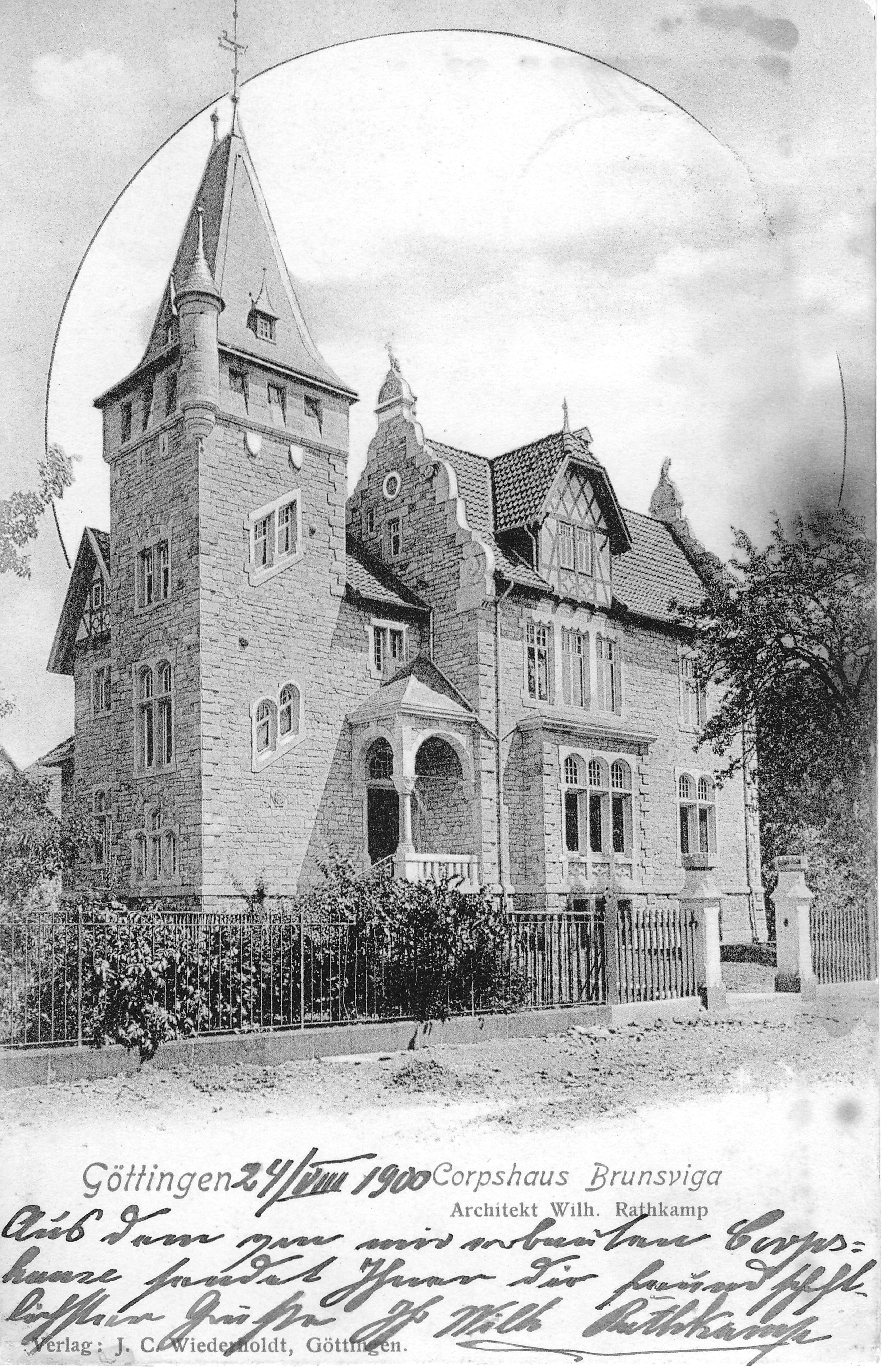 house of the Corps Brunsviga Göttingen student fraternity, postcard of 1900, with personal handwritten compliments by the architect Wilhelm Rathkamp Haus des Corps Brunsviga Göttingen, Postkarte von 1900, mit persönlichen handschriftlichen Grüßen des Architekten Wilhelm Rathkamp Aufdruck: „Göttingen Corpshaus Brunsviga Architekt Wilh. Rathkamp“ Handschriftlich: "24/VIII 1900 Aus dem von mir erbauten Corpshause sendet Ihnen die freundschaftlichsten Grüße Ihr Wilh Rathkamp“